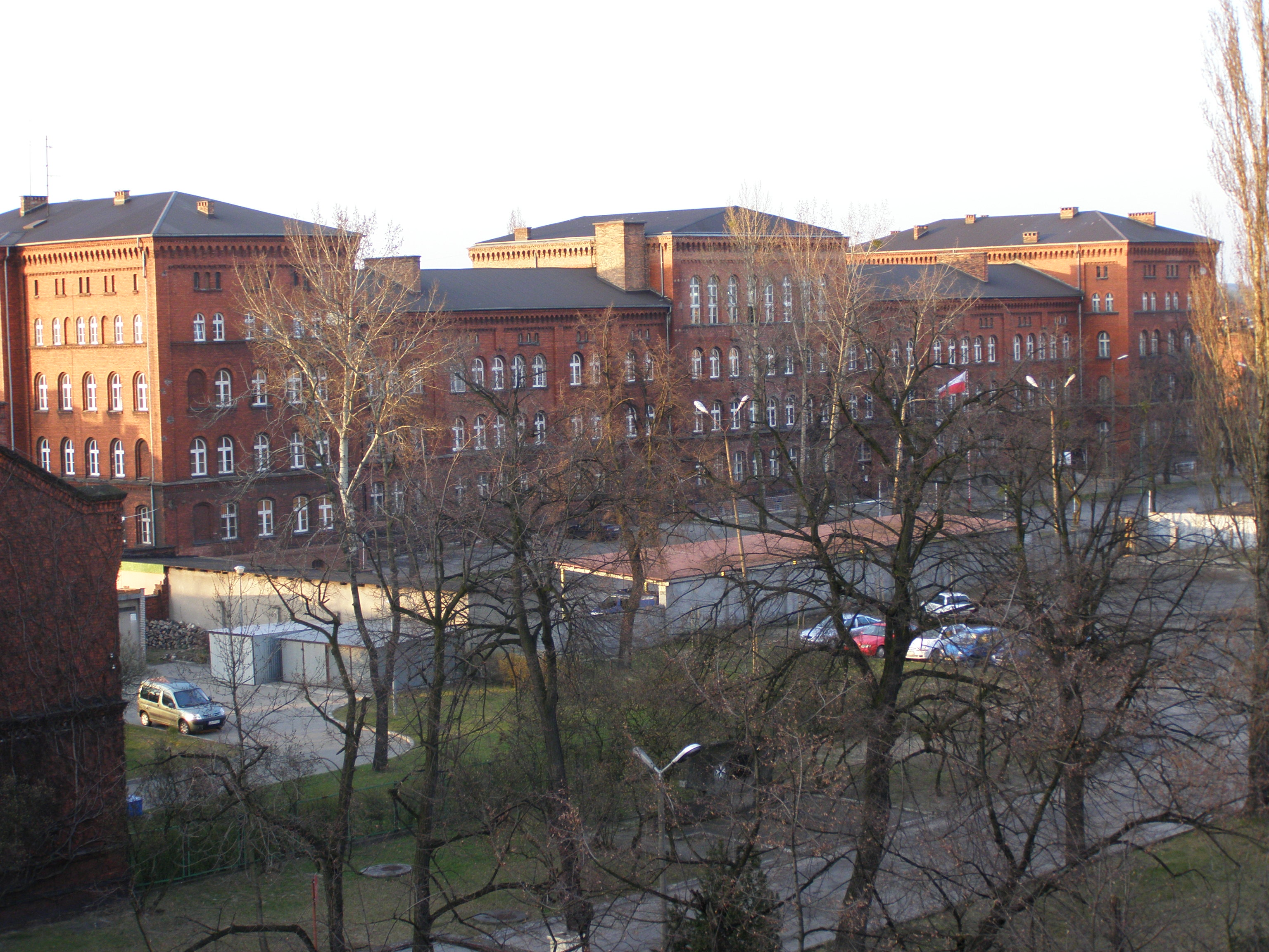 Bydgoszcz - koszary Żandarmerii Wojskowej przu ul. Zygmunta Augusta